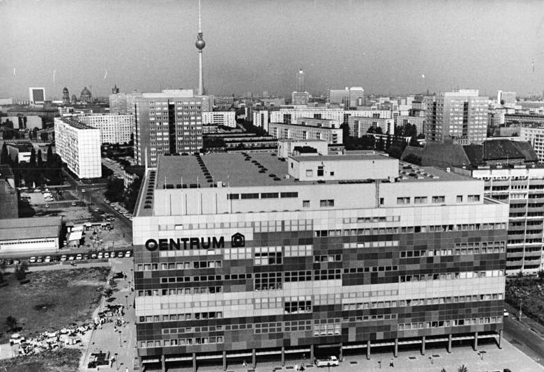 Berlin, "Centrum"-Warenhaus ADN-ZB Kaspar-9.6.81 Berlin: Bilanz- Mit dem Centrum- Warenhaus am Ostbahnhof entstand in der vergangenen Legislaturperiode eine bedeutende Handelseinrichtung in der DDR-Hauptstadt.